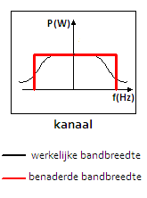 Een illustratie van de benaderde versus de werkelijke bandbreedte waarover een kanaal kan beschikken.